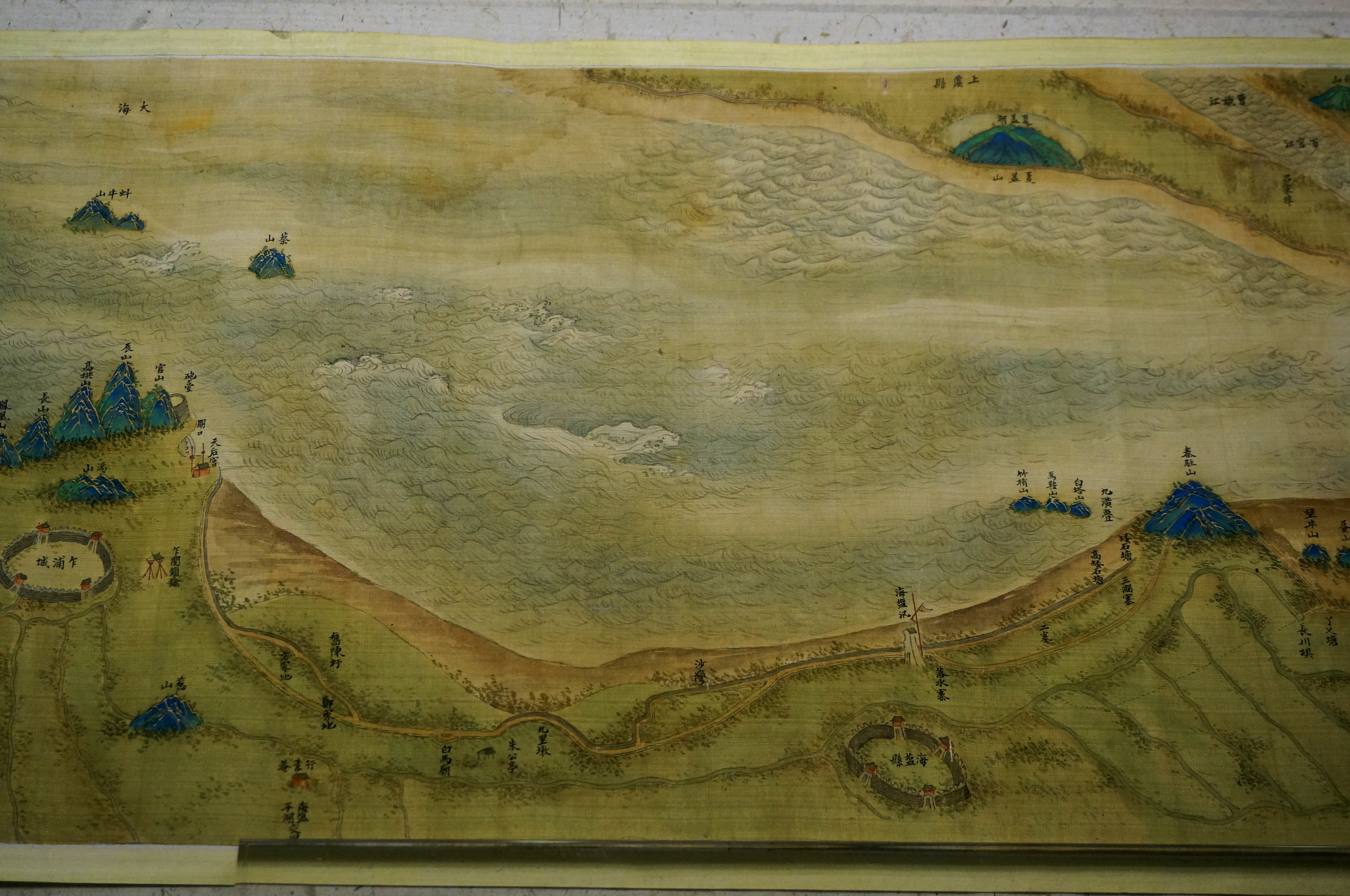 清代沈宗骞《浙江海塘图卷》局部，示海盐县城及周边地区，浙江省博物馆藏。